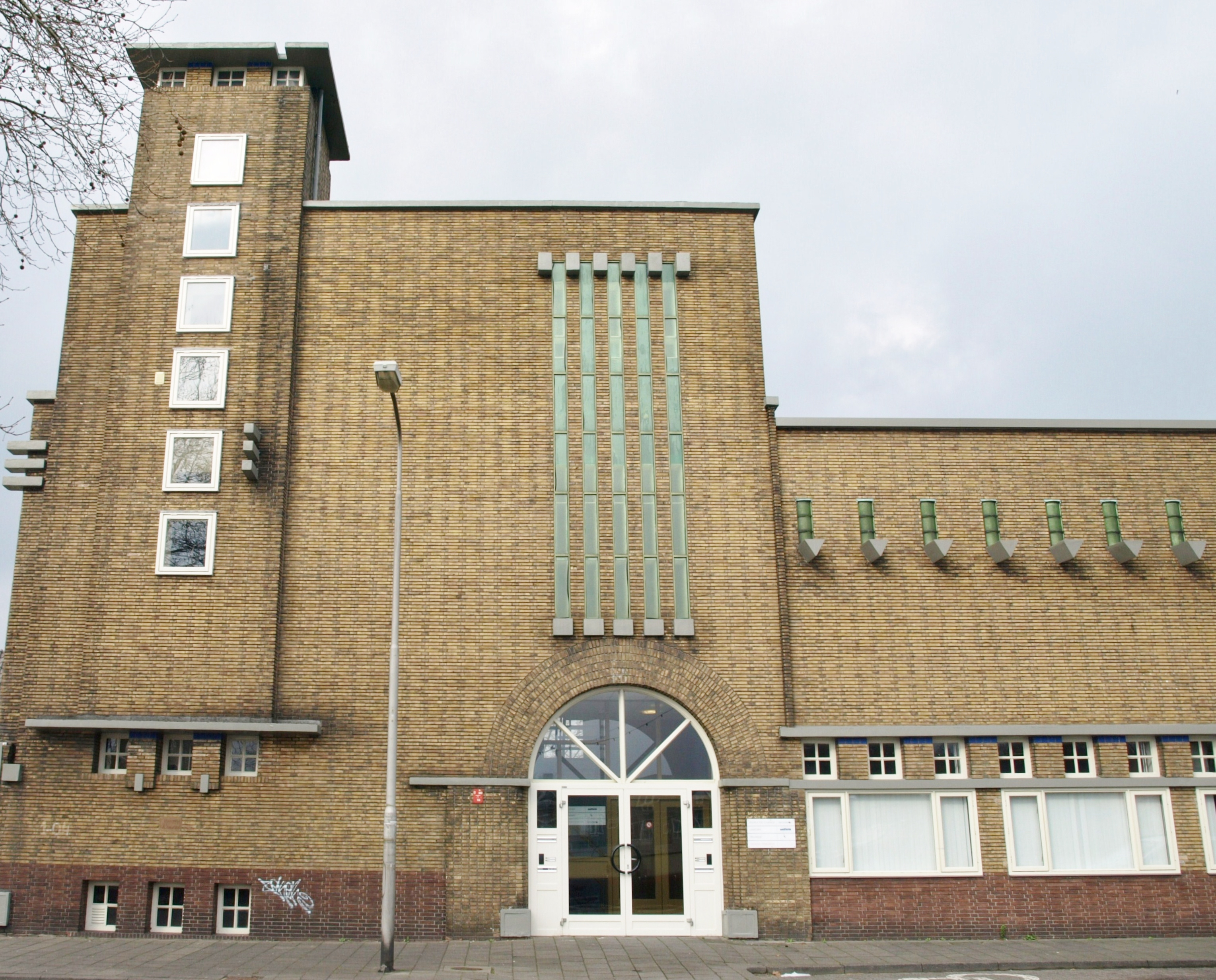 Voormalige meelfabriek NV A.C. van Loon, bouwjaar 1935, architect Jos.C.A.Schijvens. Stijl: Amsterdamse school/Expressionisme.